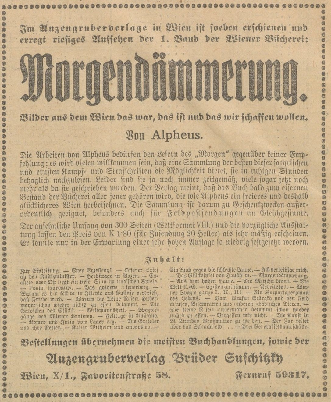 Karl Colbert Morgendämmerung Anzeige Anzengruberverlag Suschitzky Wien 1915